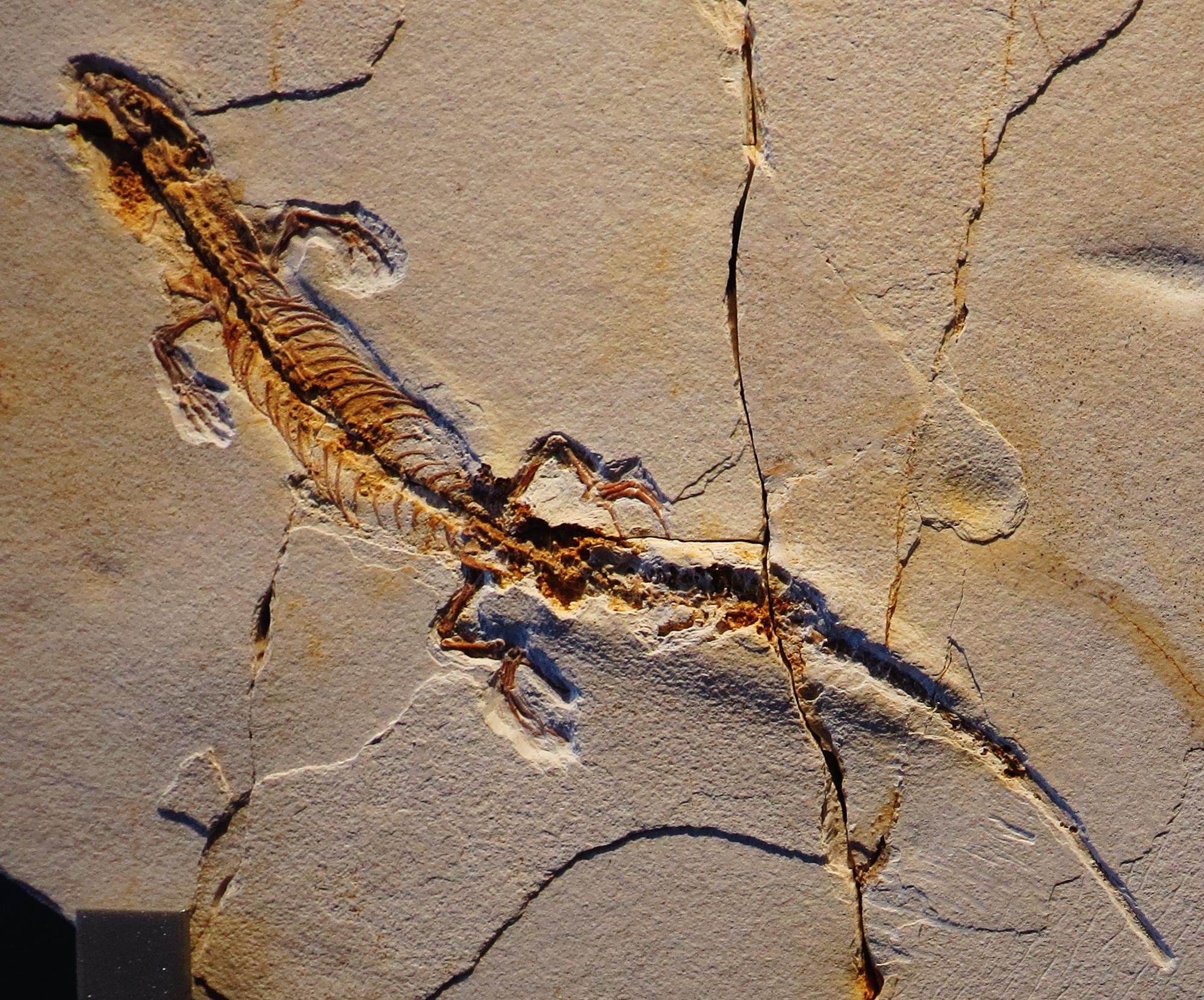 Took the picture at Jura-Museum, Eichstaett